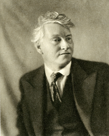 Фёдор Фёдорович Федоровский (1883 — 1955), Народный художник РСФСР, Главный художник Большого театра, Москва, СССР.